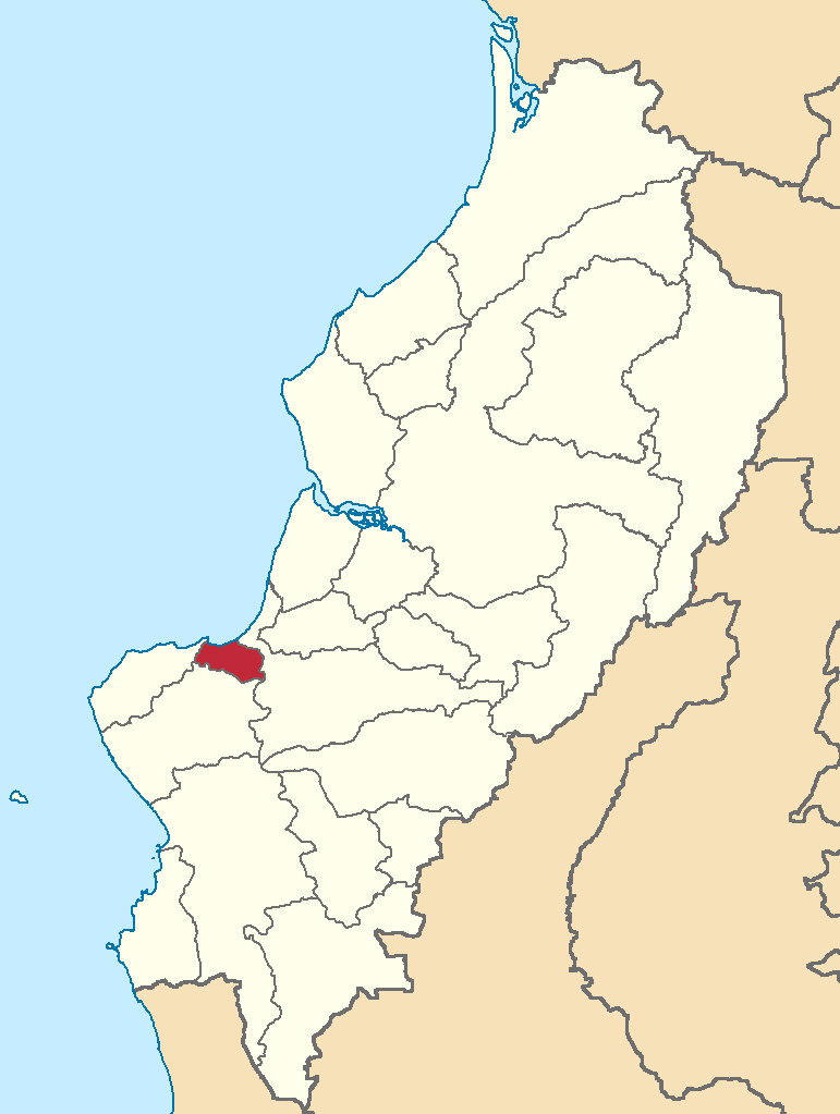 Mapa localizador del cantón en Manabí, Ecuador